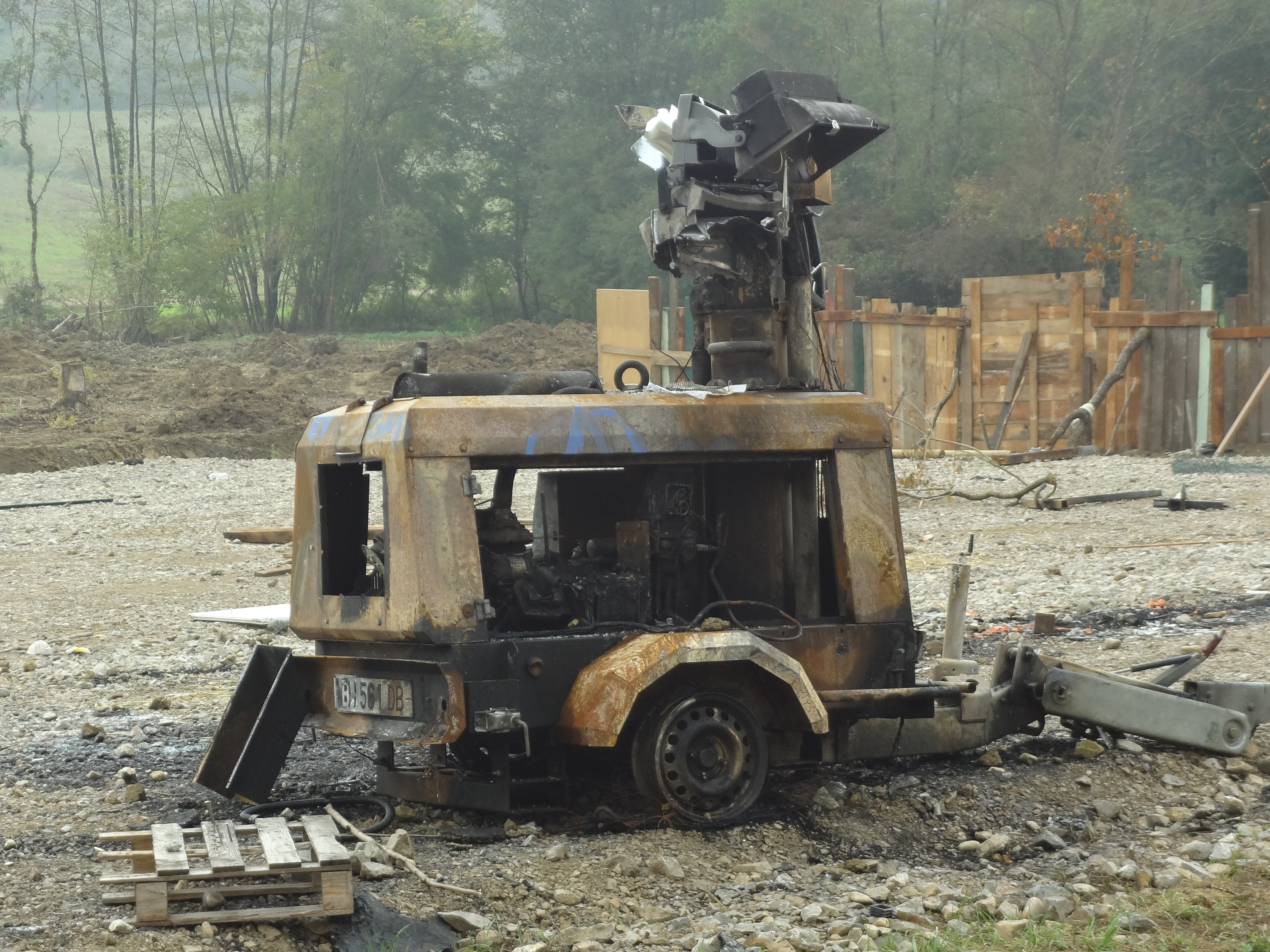 Le transformateur qui a suscité les affrontements menant à la mort de Rémi Fraisse.